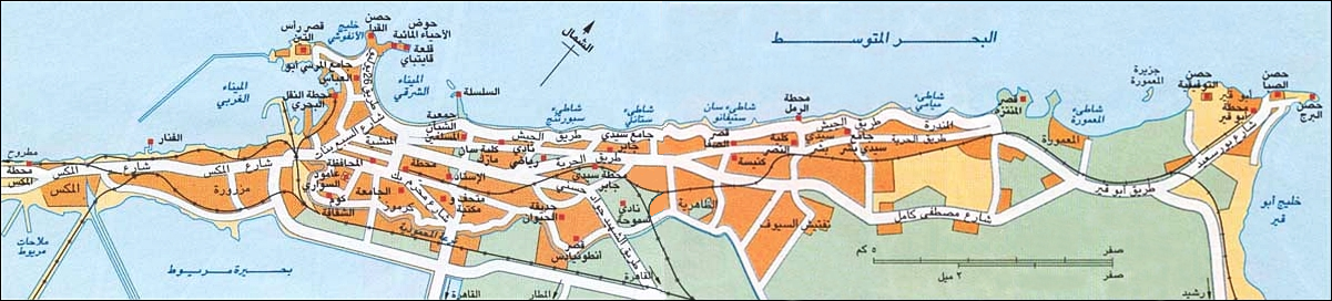 خريطة عامة لمدينة الإسكندرية